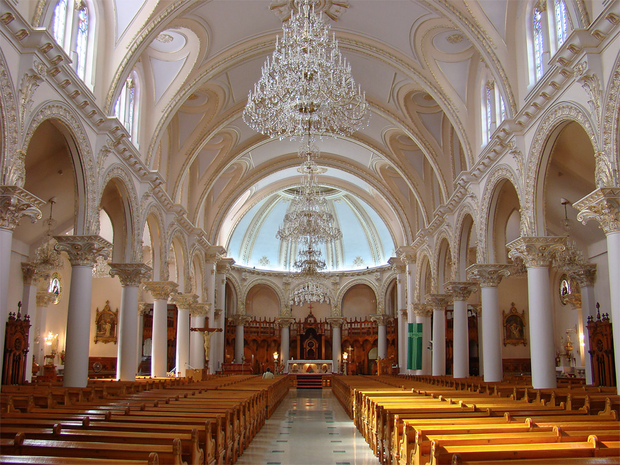 Cathédrale Saint-Hyacinthe-le-Confesseur, Saint-Hyacinthe, Montérégie, Québec, Canada.